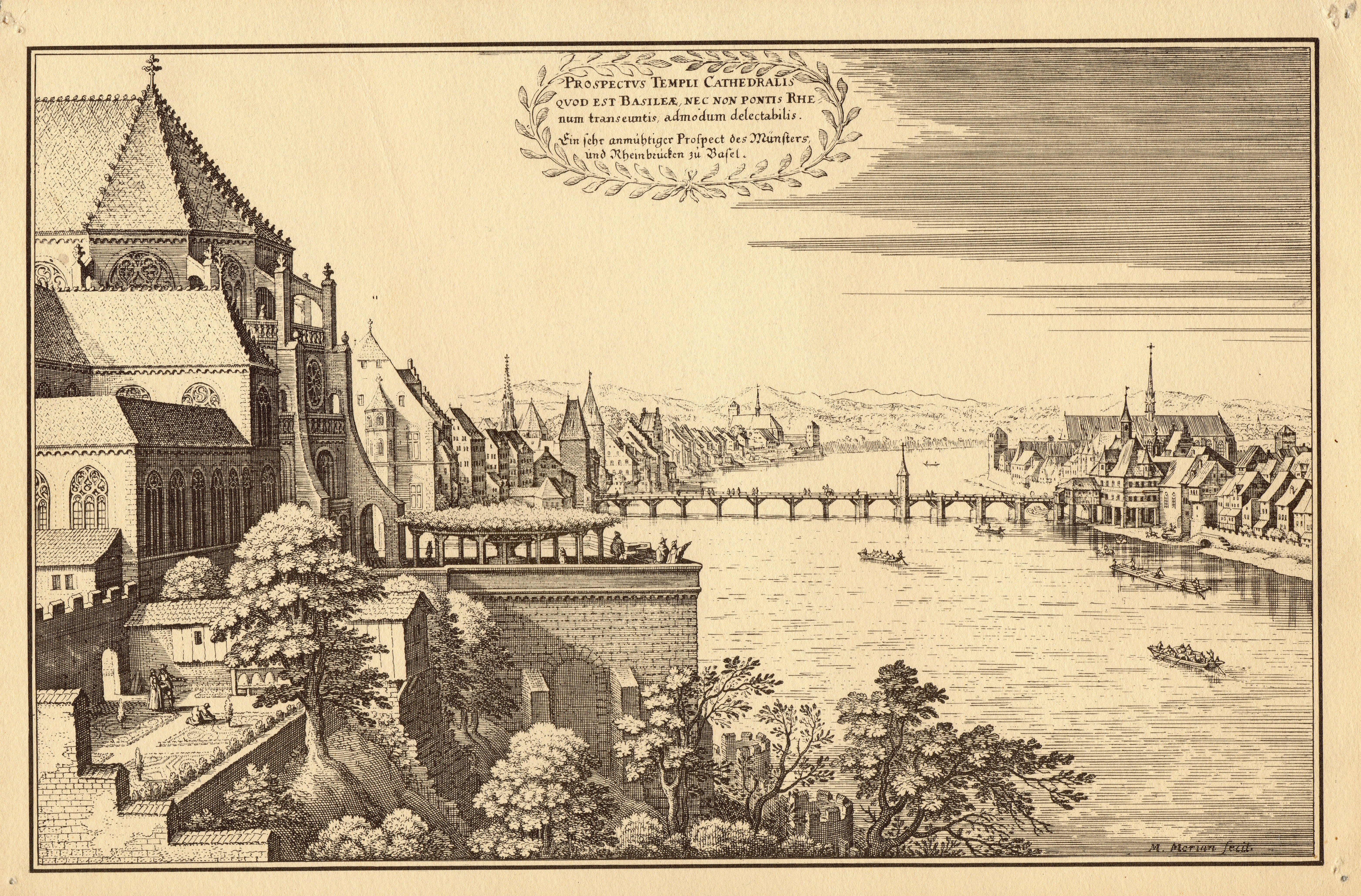 Kupferstich von Basel um 1648